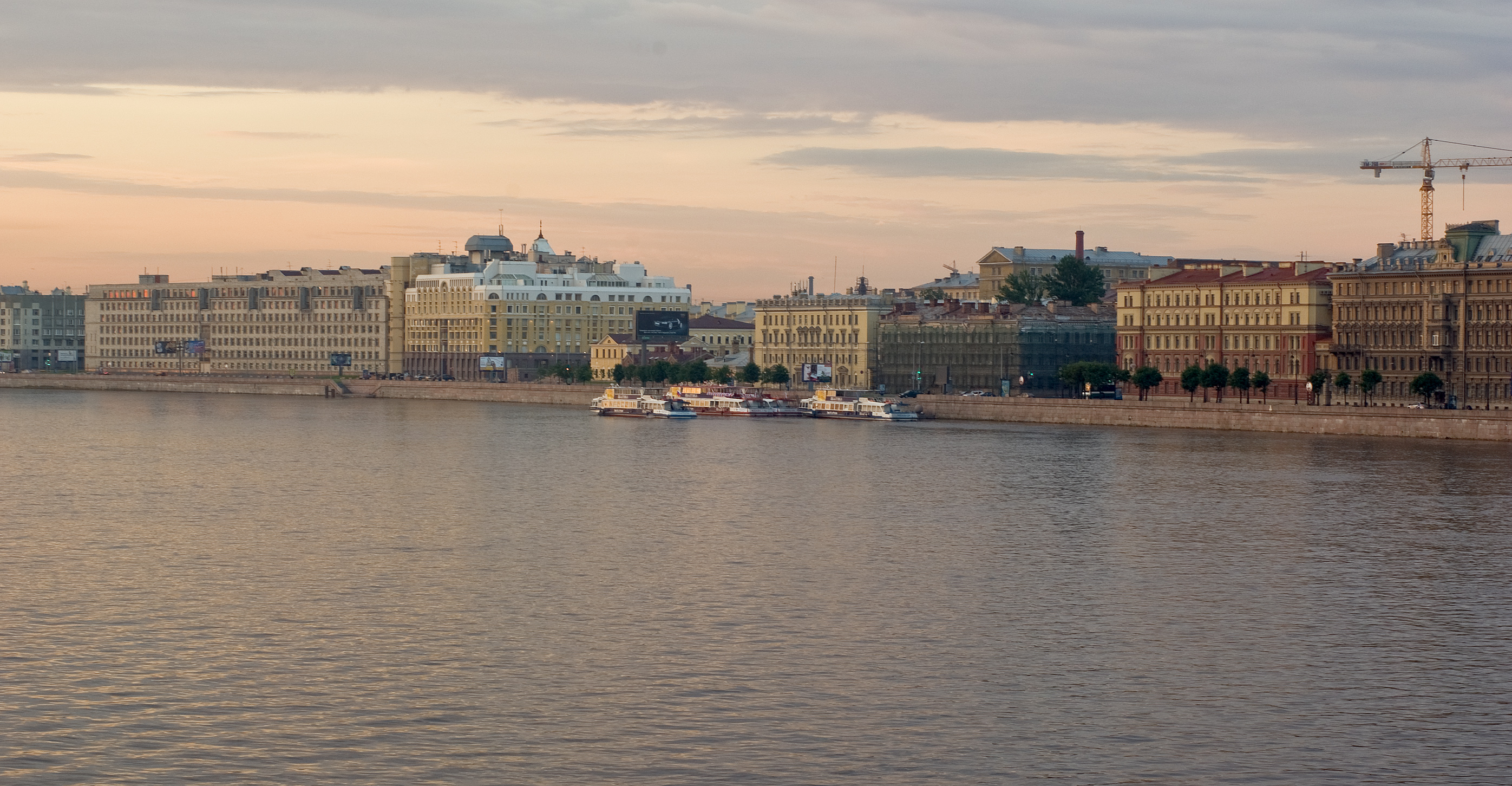 Воскресенская набережная (Санкт-Петербург)